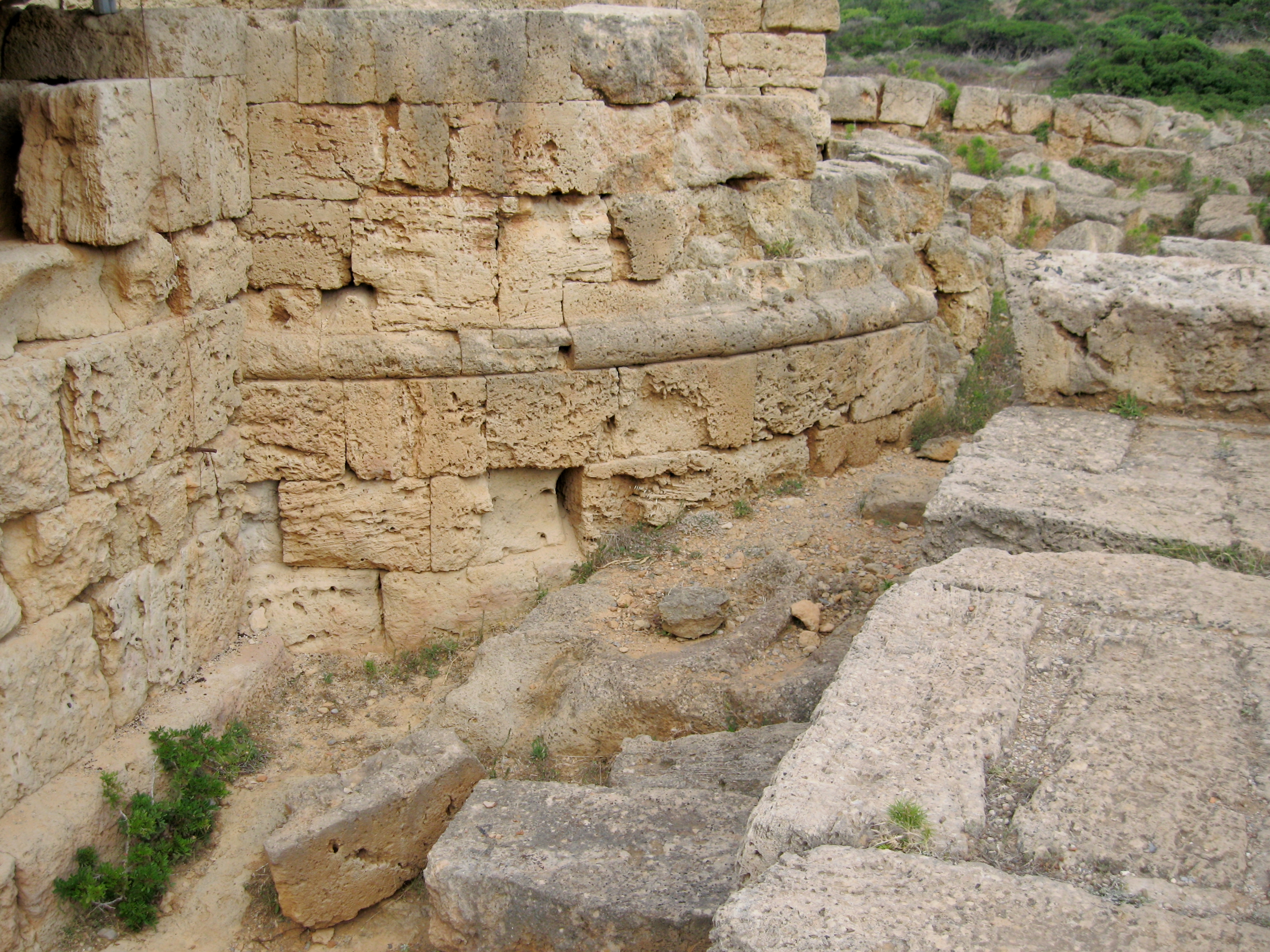 Phalasarna, Kissamos, Nomos Chania, Crete, Greece